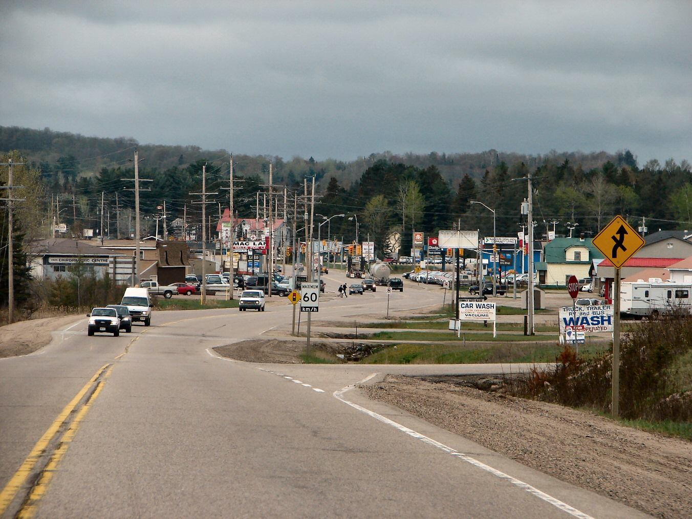 Sundridge, Ontario, Canada